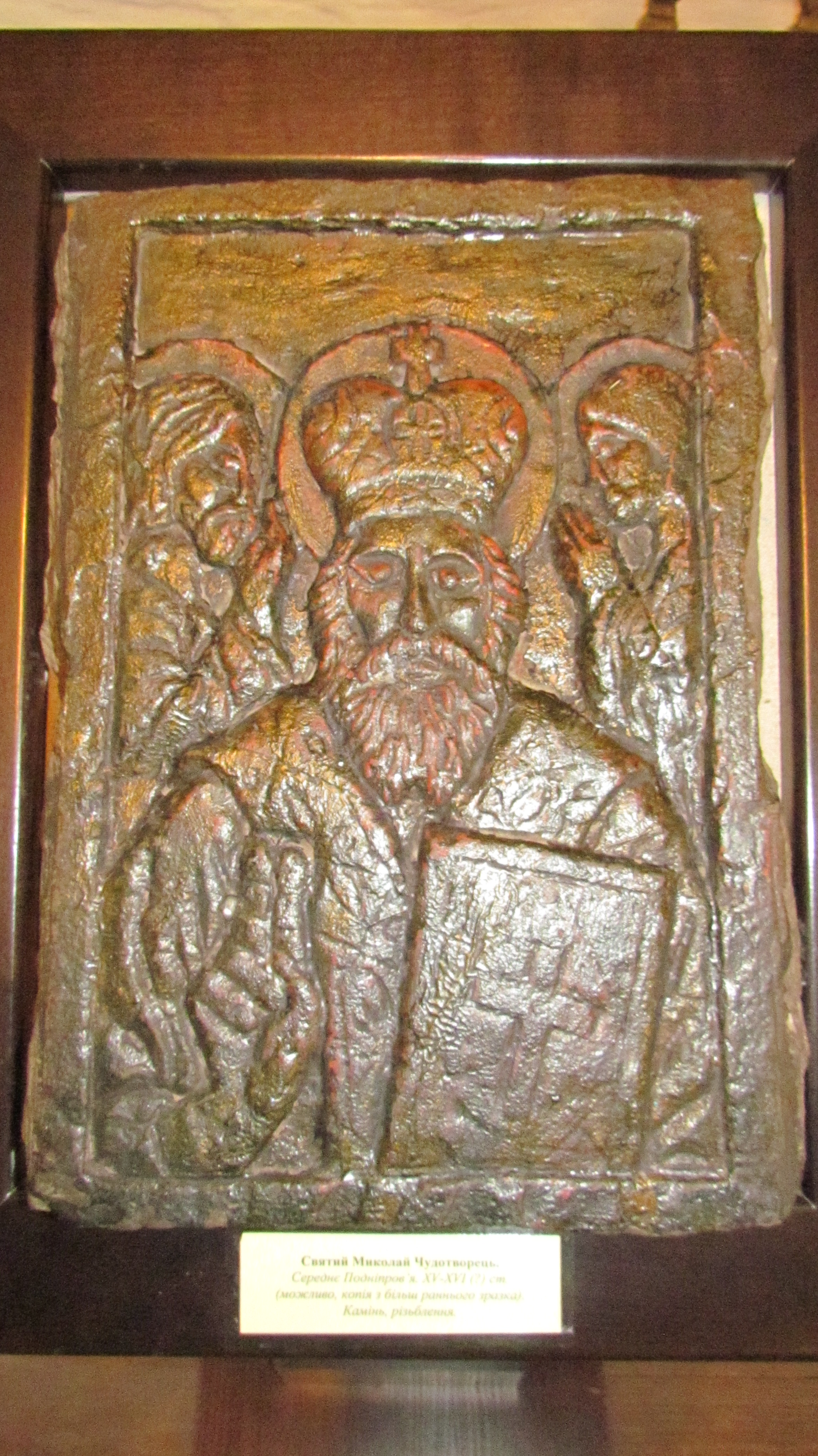 Одна з небагатьох чудотворних ікон у Музеї української домашньої ікони в Радомишлі